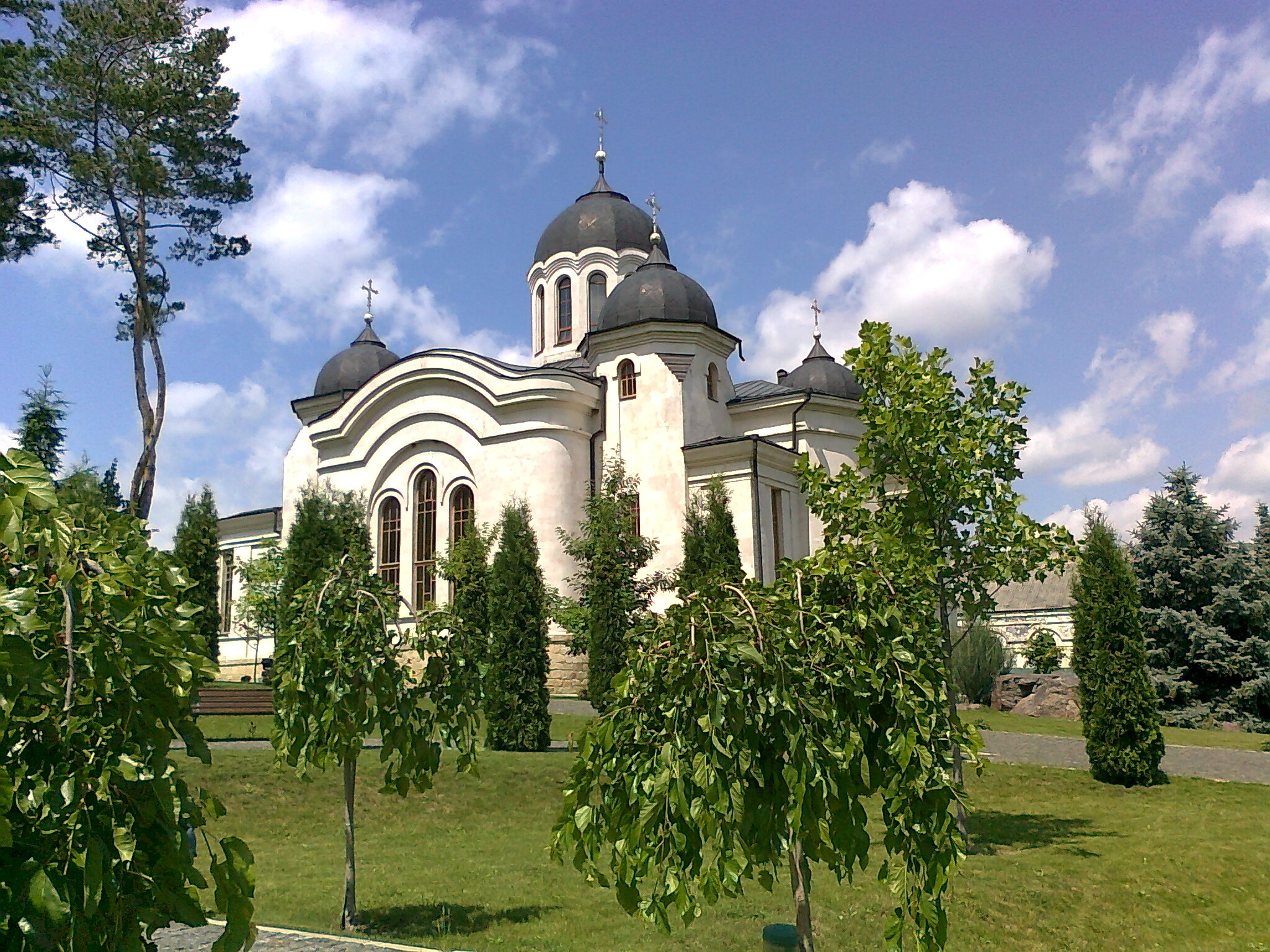 Курки — православный монастырь в Оргеевском районе Молдавии.